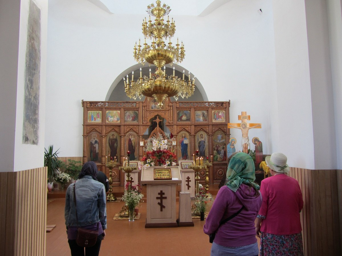 Петрыкаў. Узнясенская царква